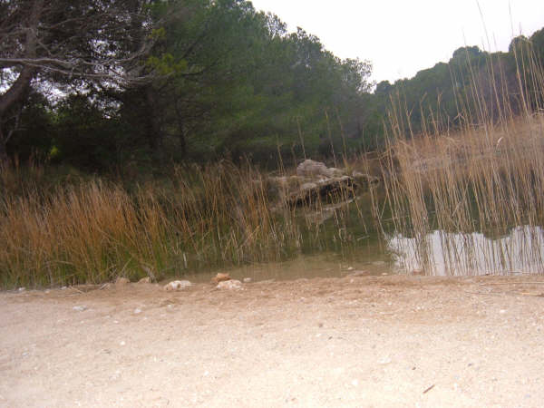 Ametlla Mar Platja Torrent del Pi (aiguamoll, on hi ha samarucs)